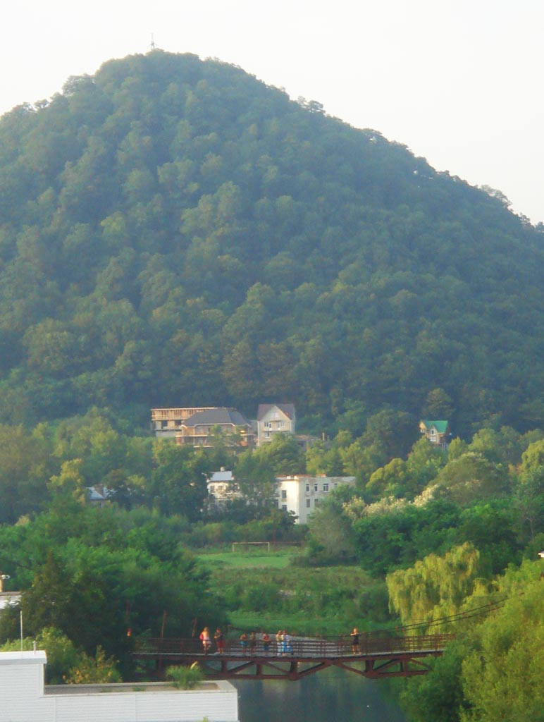 Дагомыс - гора и пешеходный мост через реку